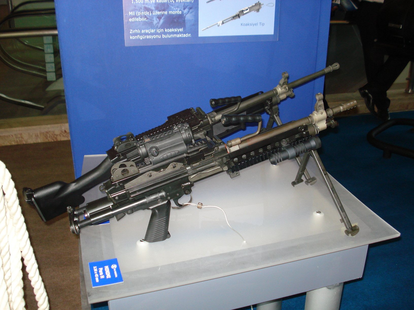 IDEF '07 Savunma Fuarı'nda çekildi.FN Minimi. 23 Mayıs 2007